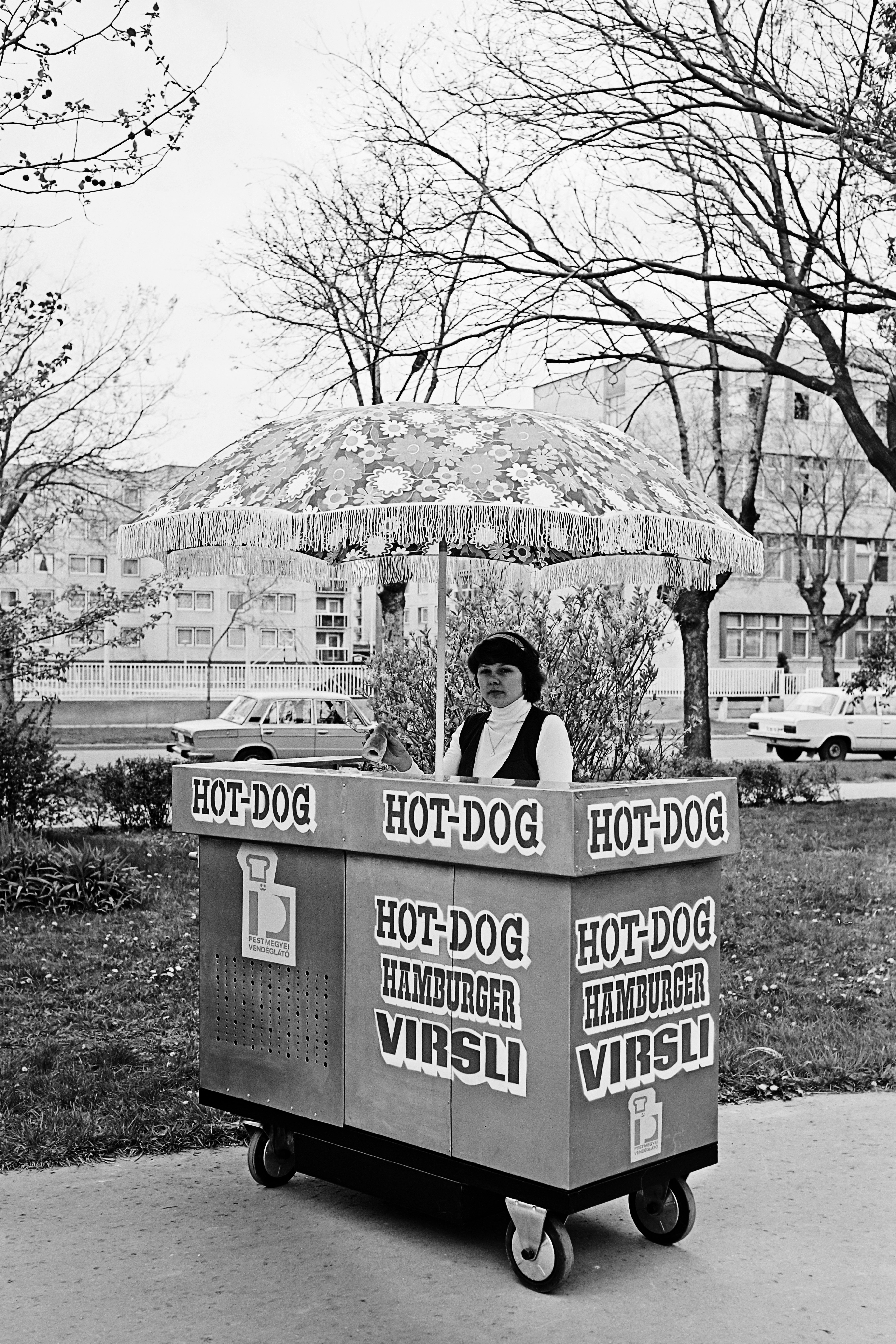 UTCAKÉP, MOZGÓÁRUS, BÜFÉ, NAPERNYŐ, NŐ